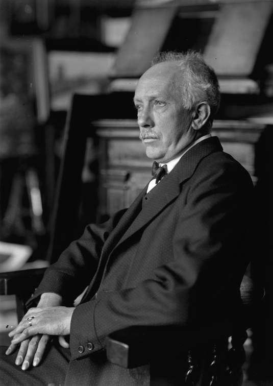 Richard Strauss (1864–1949)